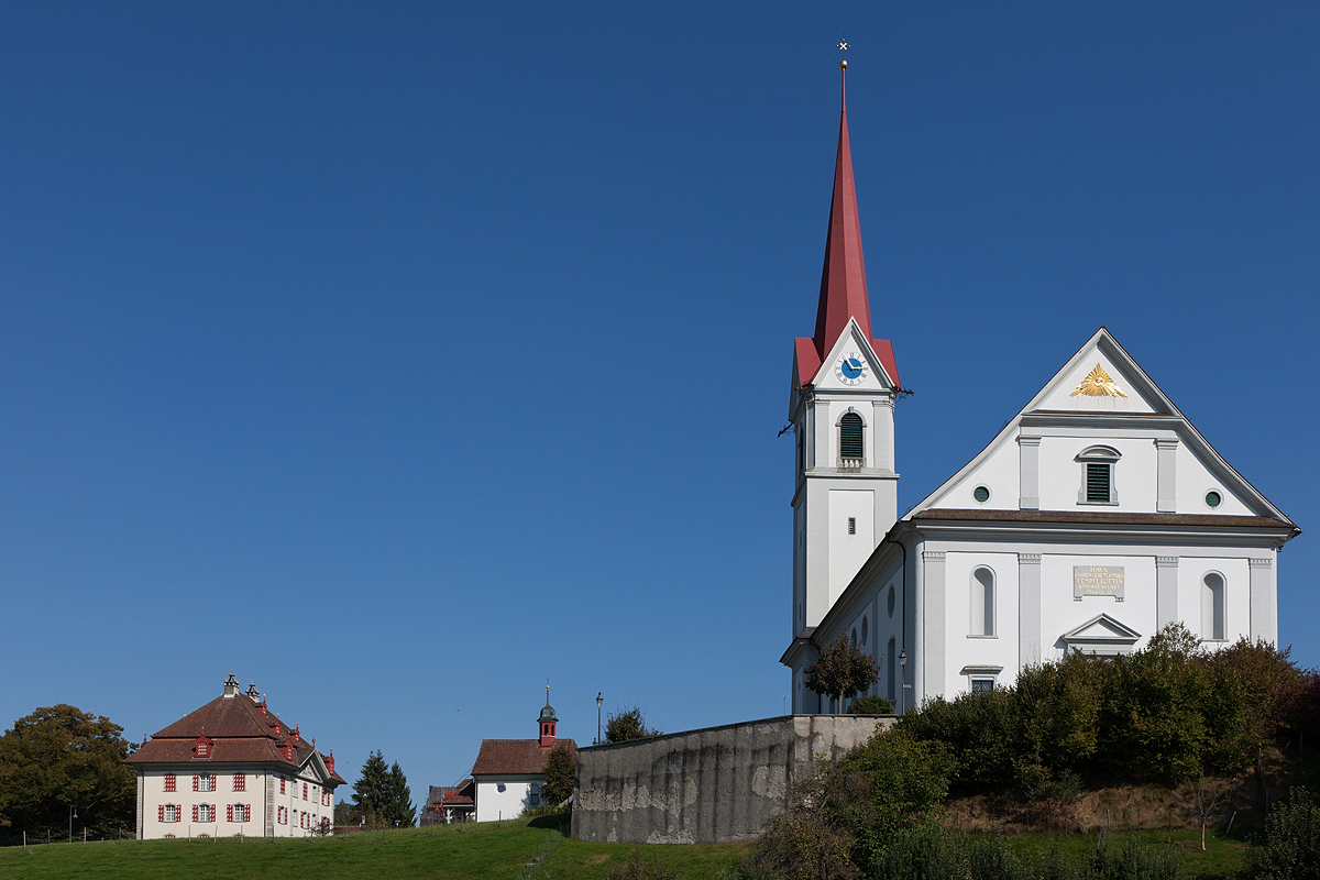 Kirche St. Vinzenz in Pfaffnau (steht unter Kulturgüterschutz), links davon das Pfarrhaus und die St. Antonius-Kapelle